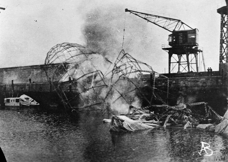 L 12 vernichtet in Oostende Hafen